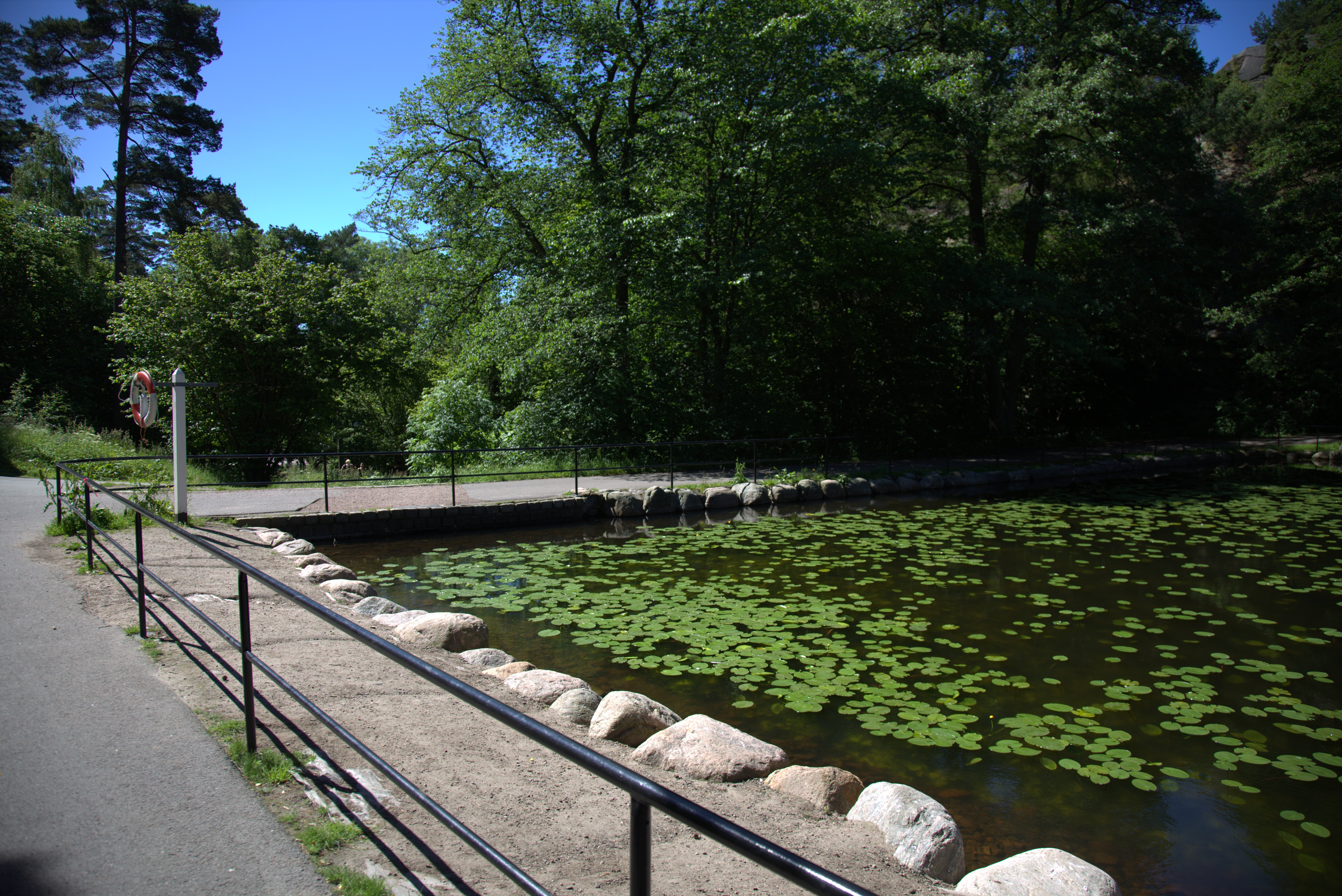 Slätta damm. Dämmet.